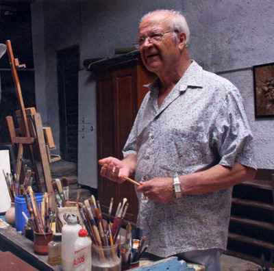 El pintor Juan Ruiz Miralles fotografiado en su estudio de pintura, donde realizaba algunos de sus cuadros.